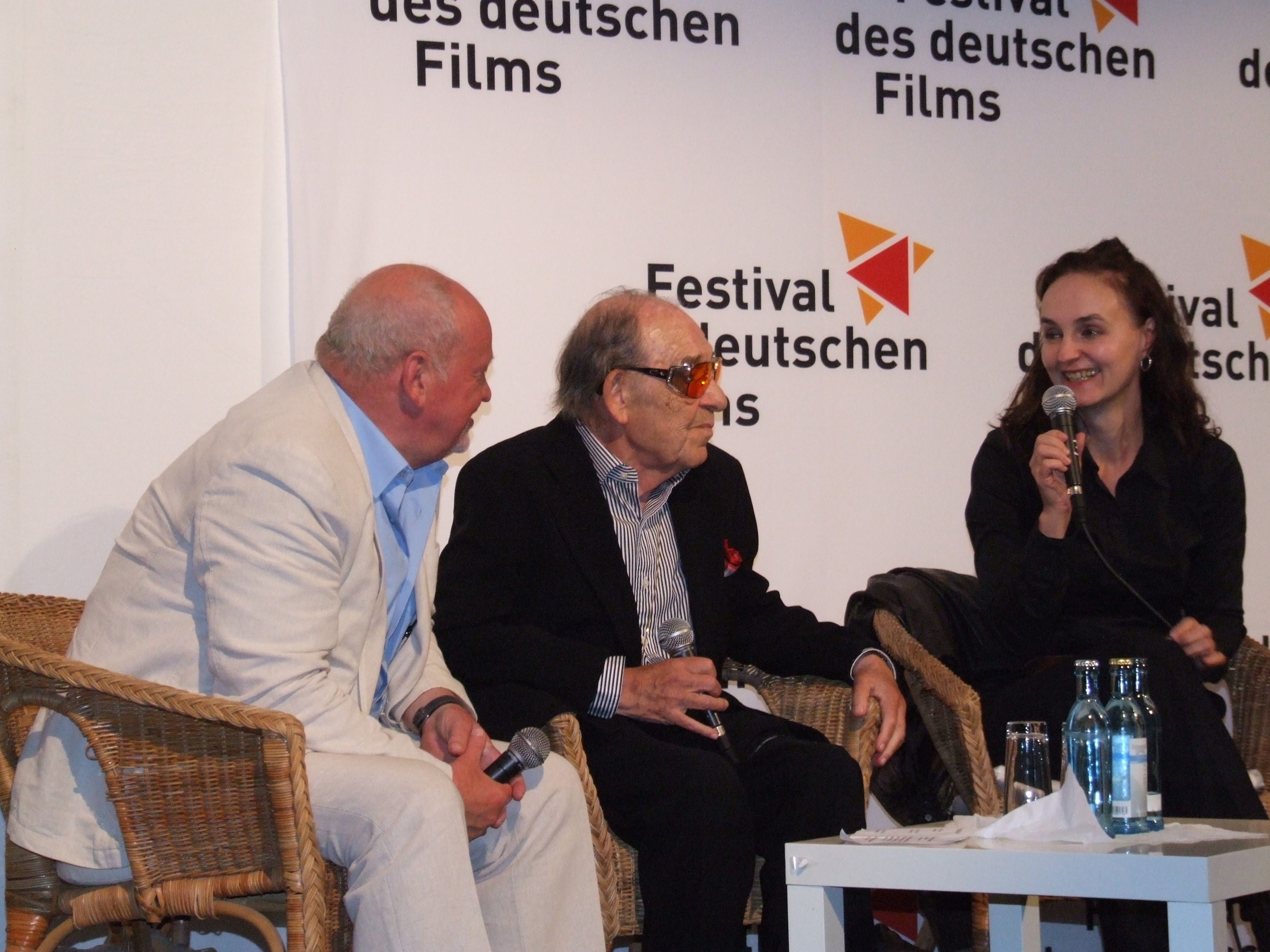 Filmgespräch auf dem Festival des deutschen Films mit (von links) Nicole Weegmann, Paul Kuhn, Dr. Josef Schnelle zu "Schenk mir dein Herz"